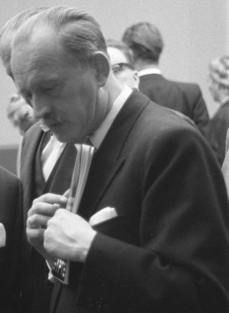 Opening tentoonstelling "5000 jaar kunst uit Egypte" minister Cals en prof. Klasens (directeur Museum van Oudheden) - Location: Leiden, Zuid-Holland